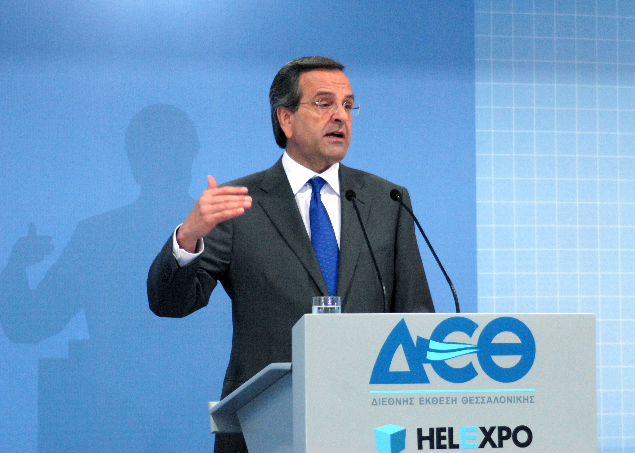 Αντώνης Σαμαράς - 77η Διεθνής Έκθεση Θεσσαλονίκης